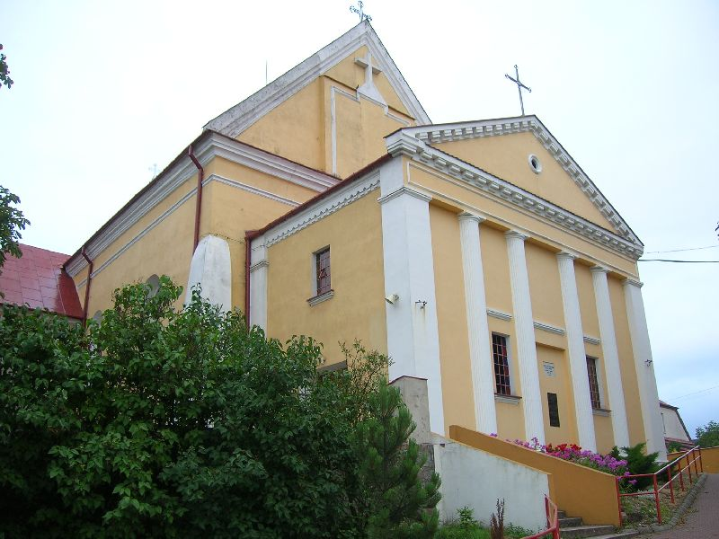 Góra Świętej Małgorzaty - kościół parafialny pw. św. Małgorzaty.